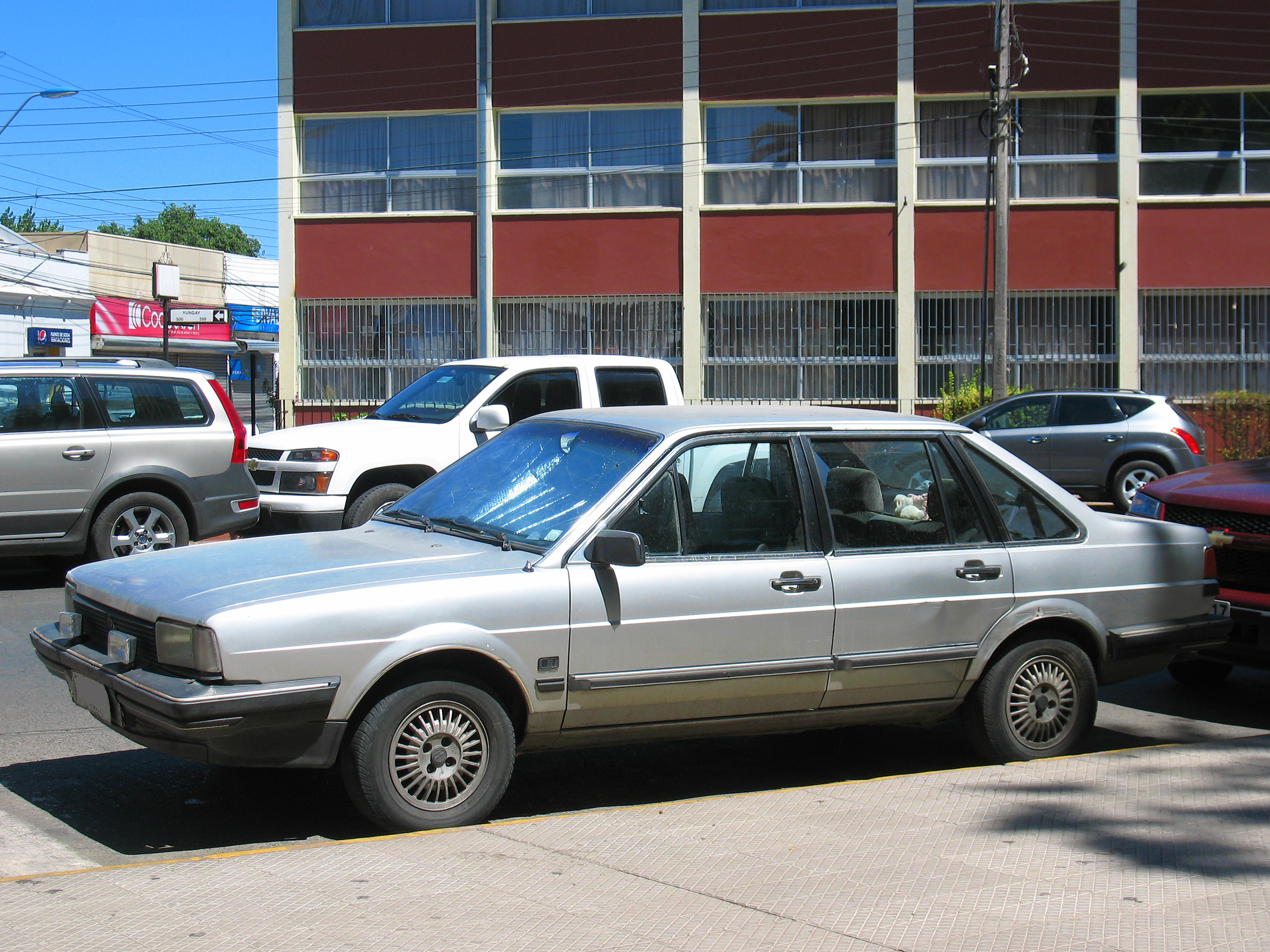 Volkswagen Santana 1.8 CD 1986